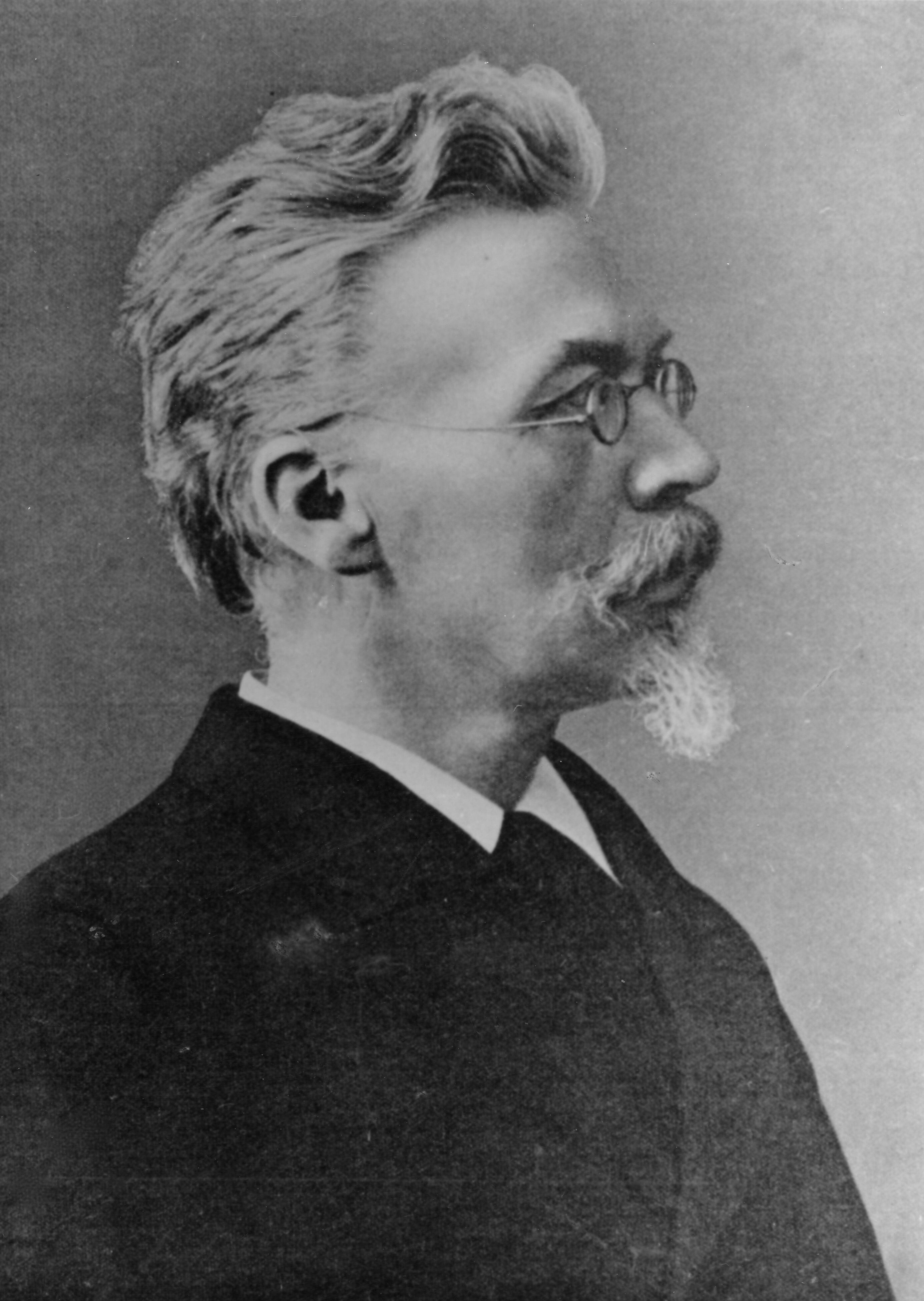 Gerard Heymans (foto: A.S. Weinberg)